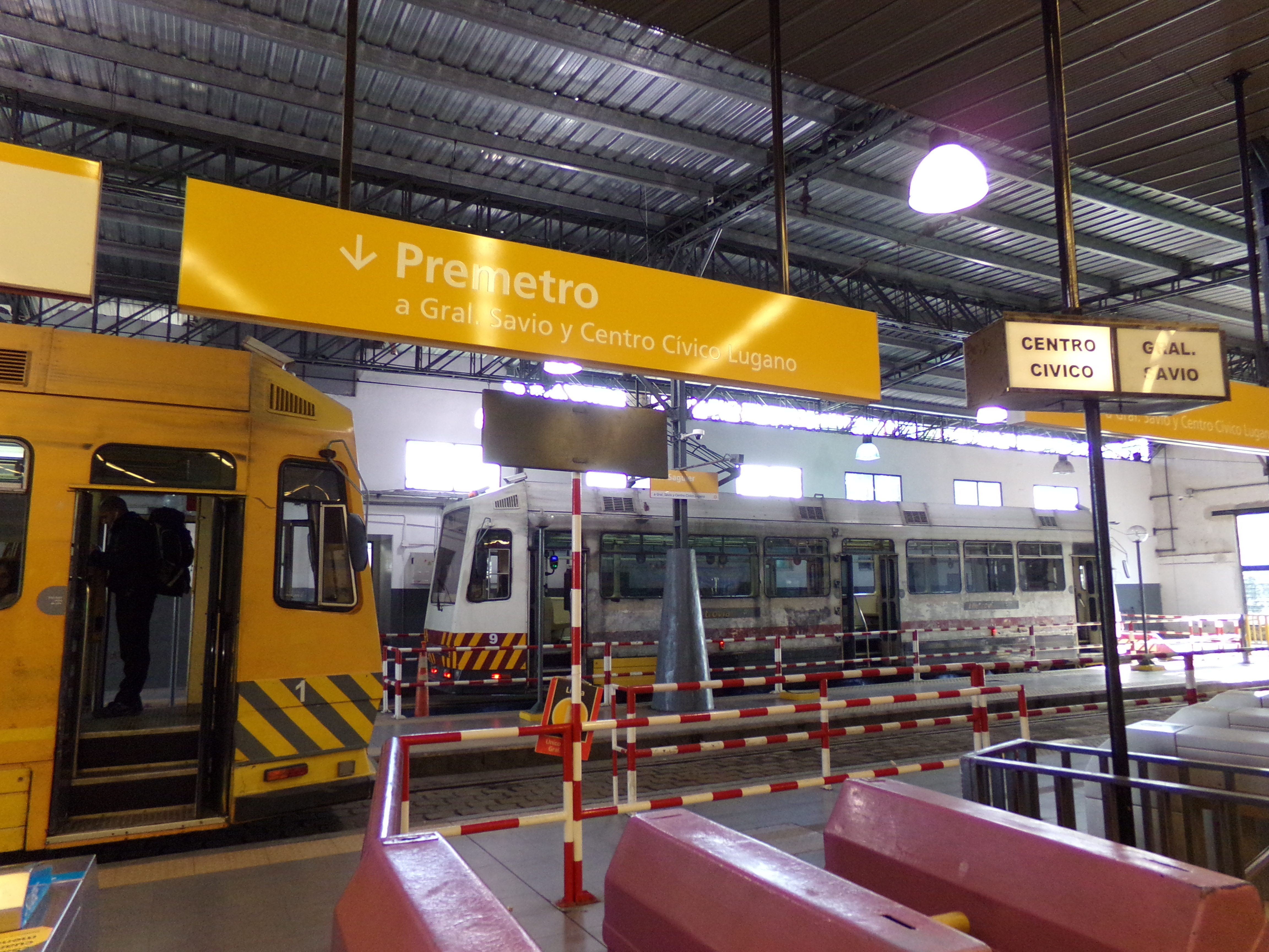 Estación Intendente Julio César Saguier del Premetro de Buenos Aires.